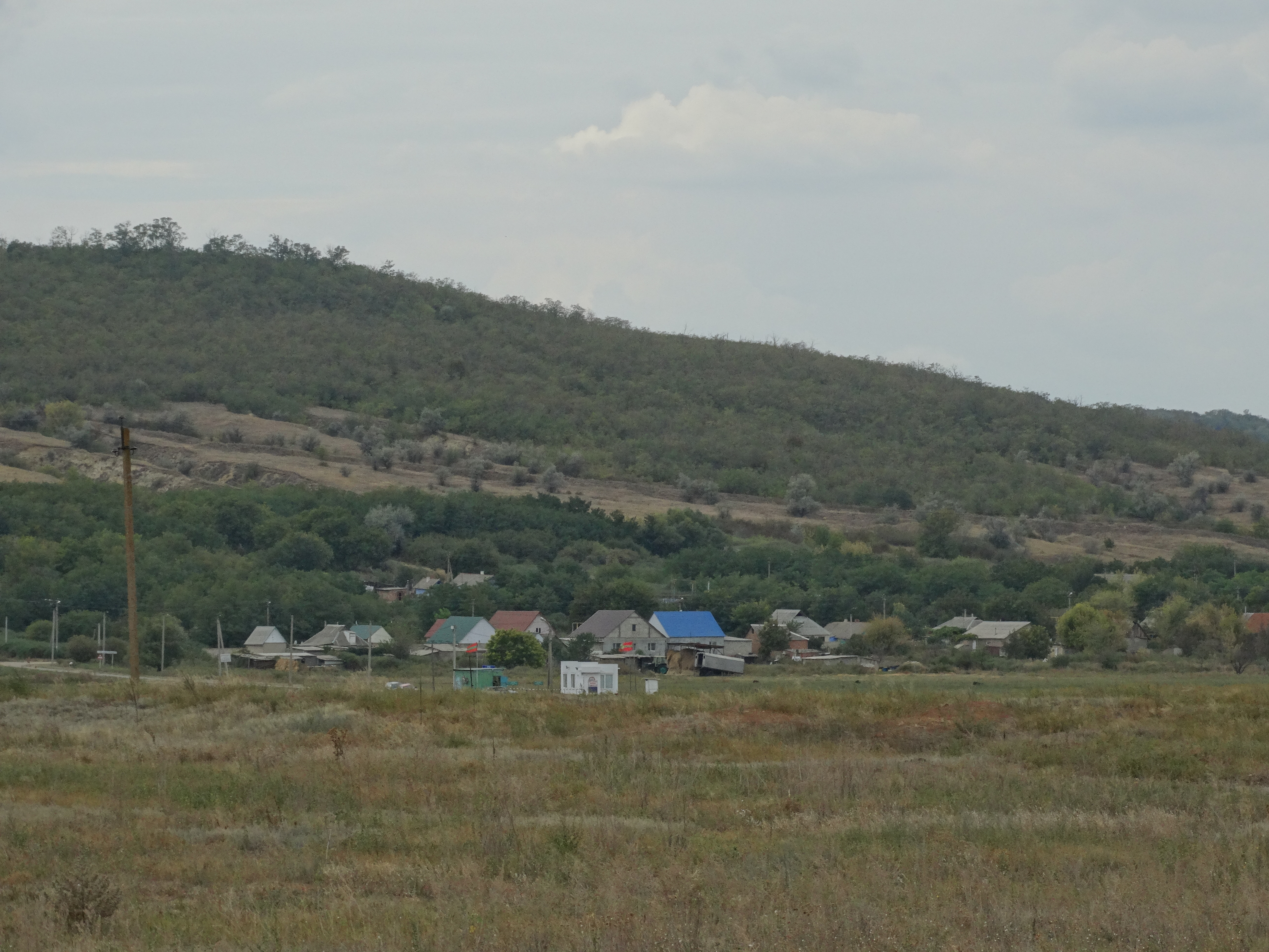 Вигляд на село Стара Андріяшівка (Молдова) з території України. Вікіекспедиція на Північ Одещини